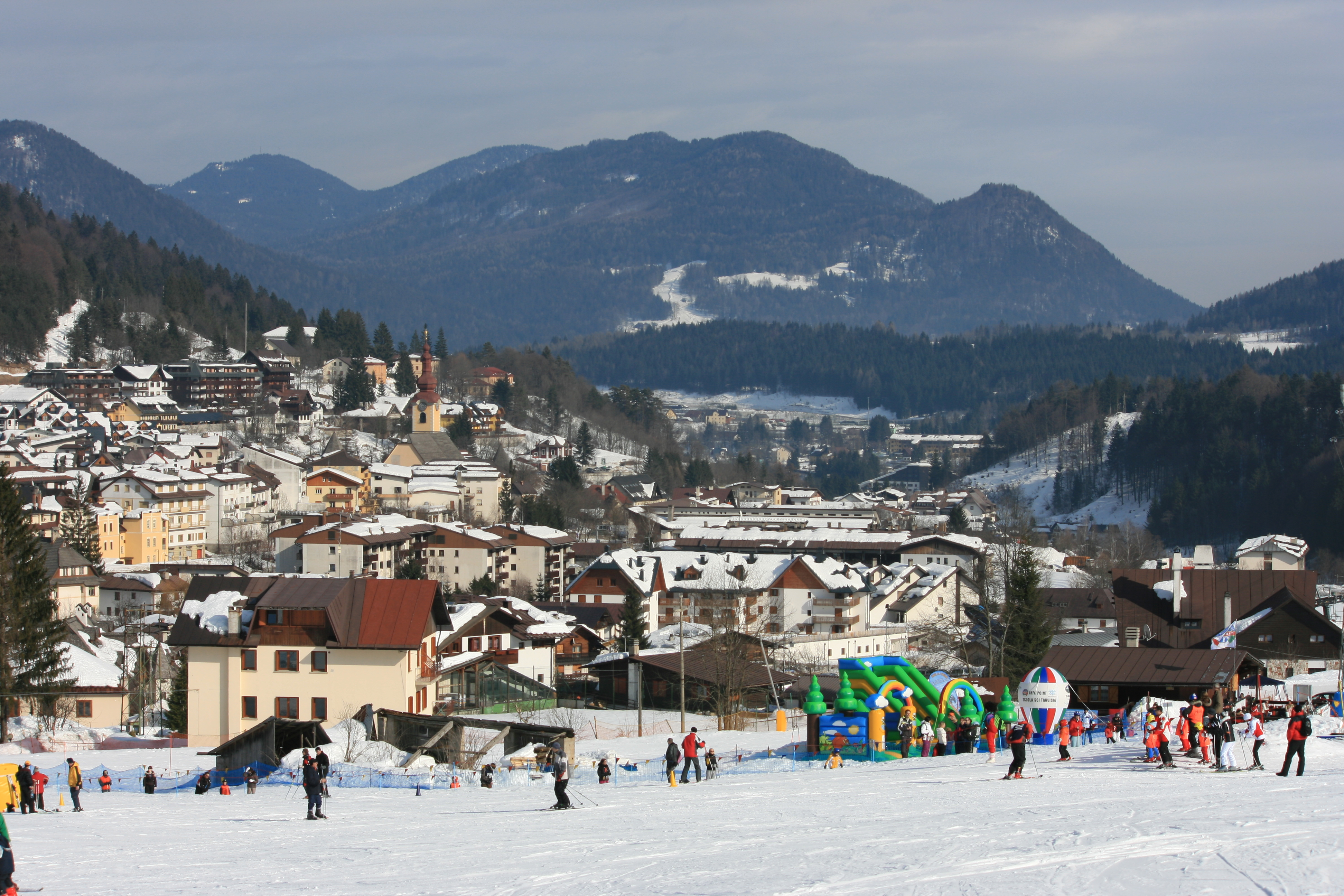 Tarvisio